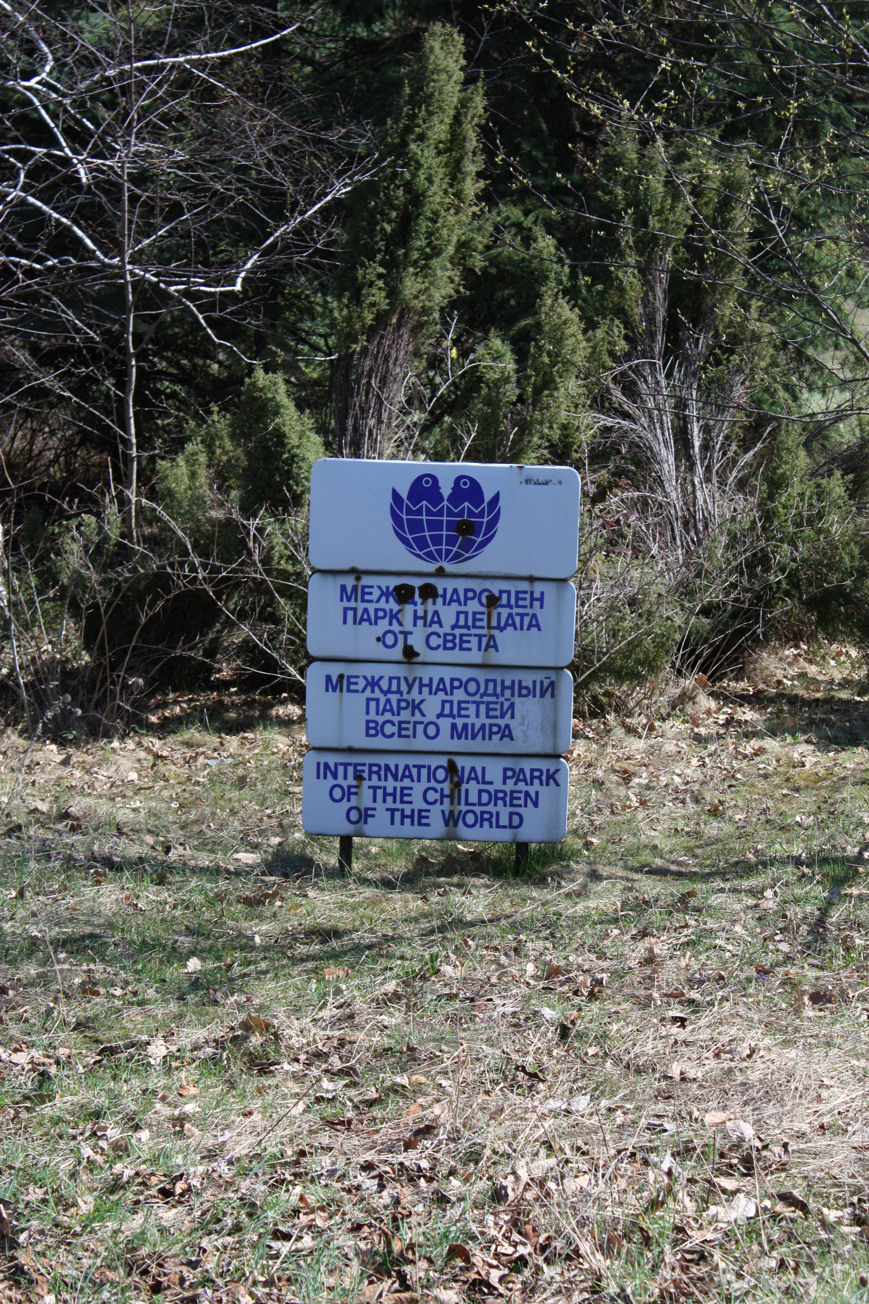 The bells, Die Glocken, Kambanite, Sofia, Bulgaria, Камбаните, София